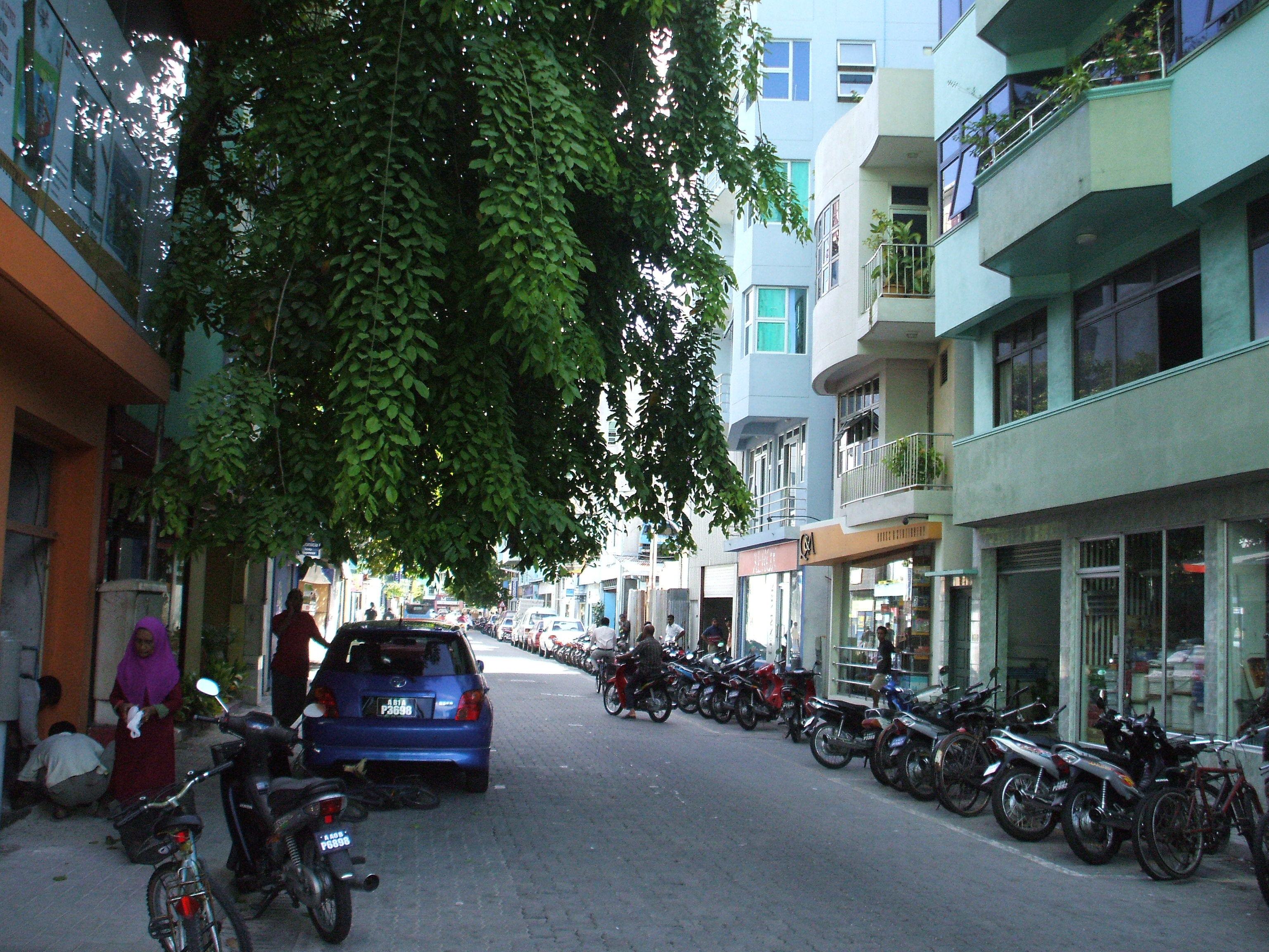 മാലിയിലെ ഒരു തെരുവ്. ഞാനെന്റെ ക്യാമറ വച്ച് എടുത്ത പടം.